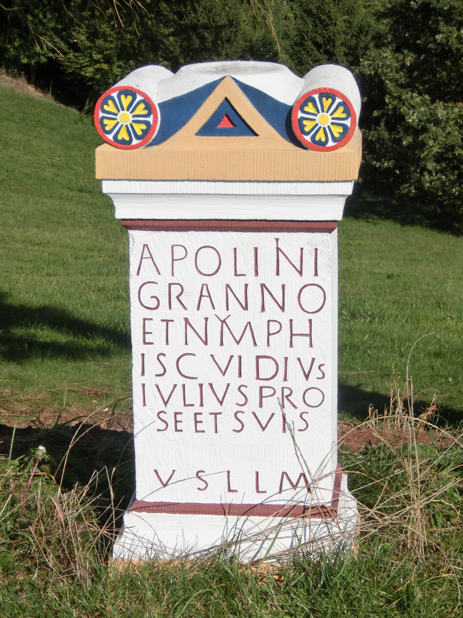 Deutschland (D) - Baden-Württemberg (BW) - Landkreis Sigmaringen (SIG) - Mengen: Archäologischer Pfad, nach Originalfund rekonstruierter Weihestein